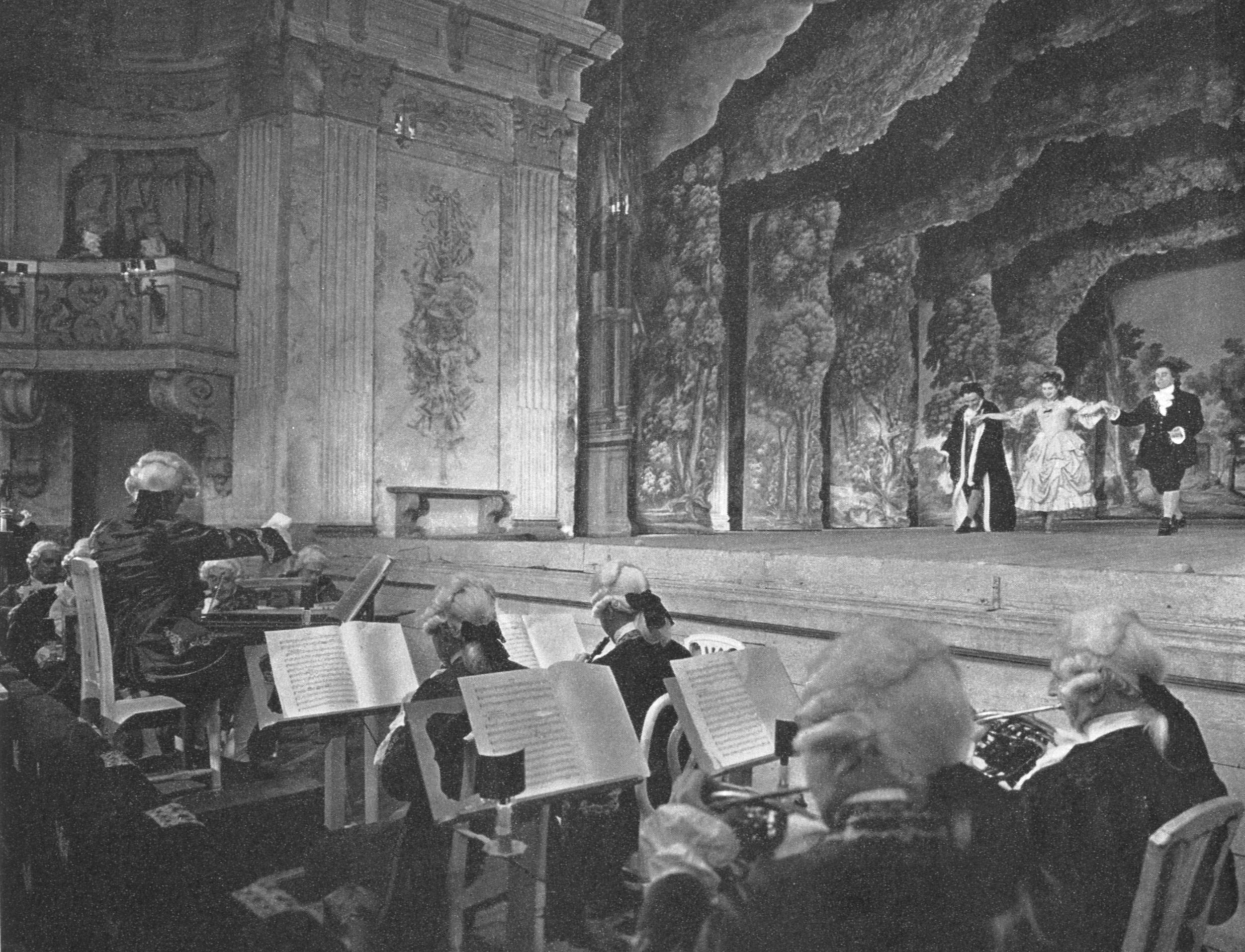 Orkestern på Drottningholms slottsteater i tidsenlig klädsel